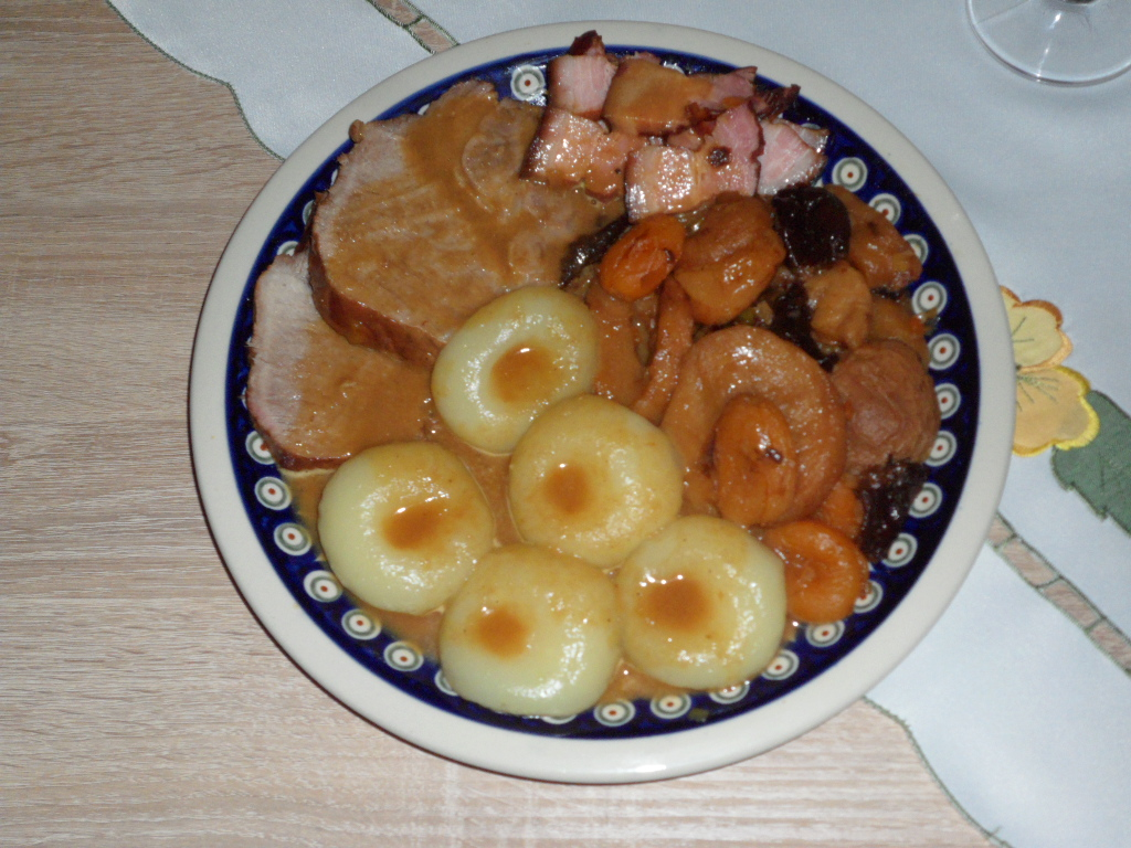 Schlesisches Himmelreich Schläsch: Schläsches Himmelreich